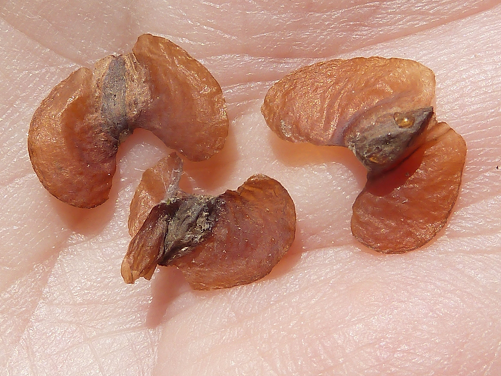 Tetraclinis articulata (Araar): Semillas bialadas con una trialada maduras. - Parque de la Huerta, Albatera (Alicante, España).